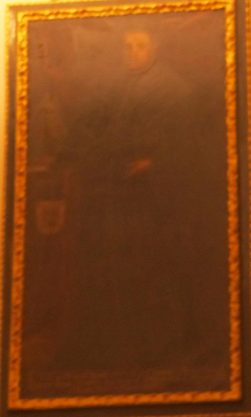 Aragonés: Arcebispo de Zaragoza Alonso Argüello